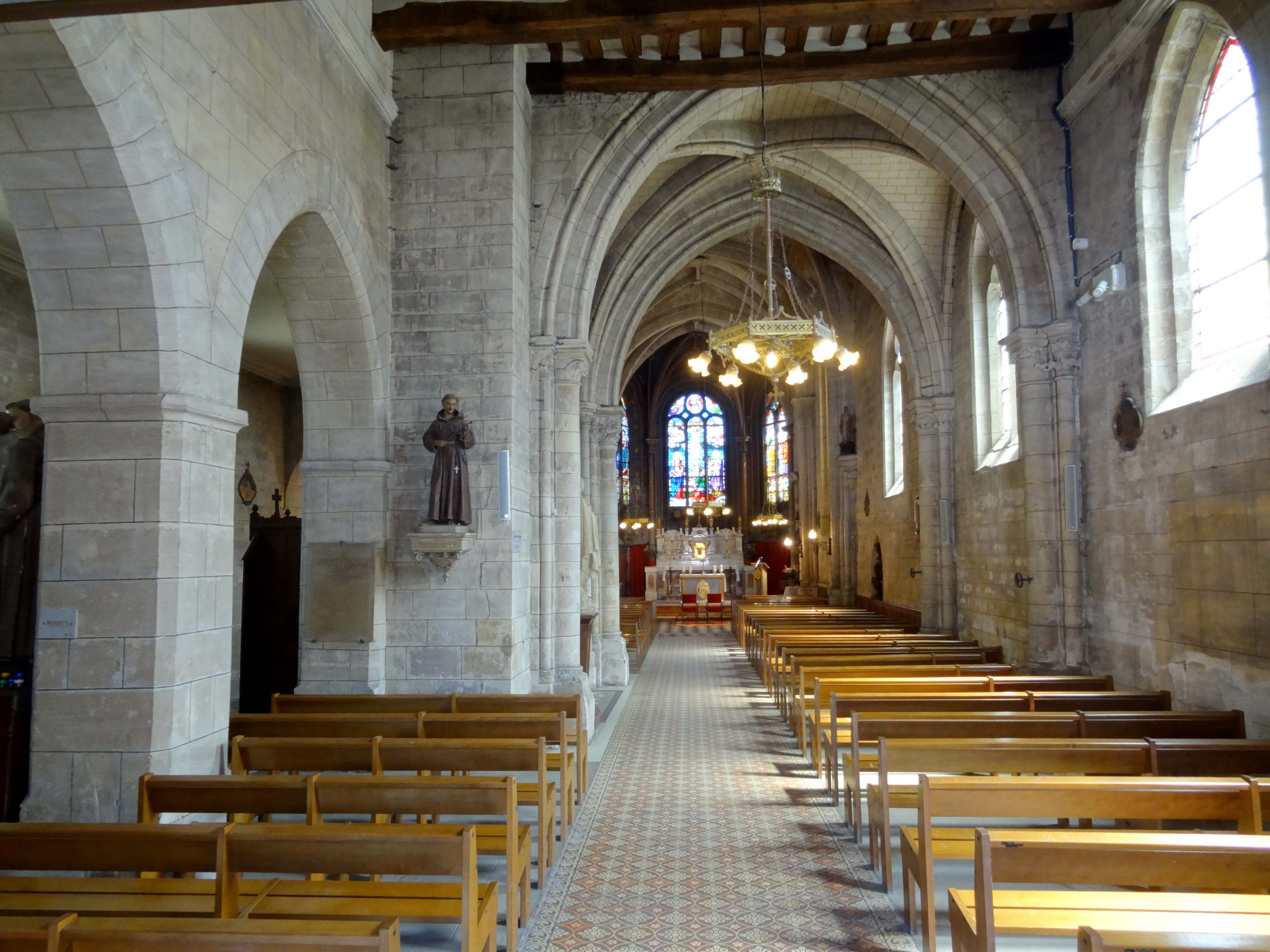 Intérieur de l'église - voir titre.